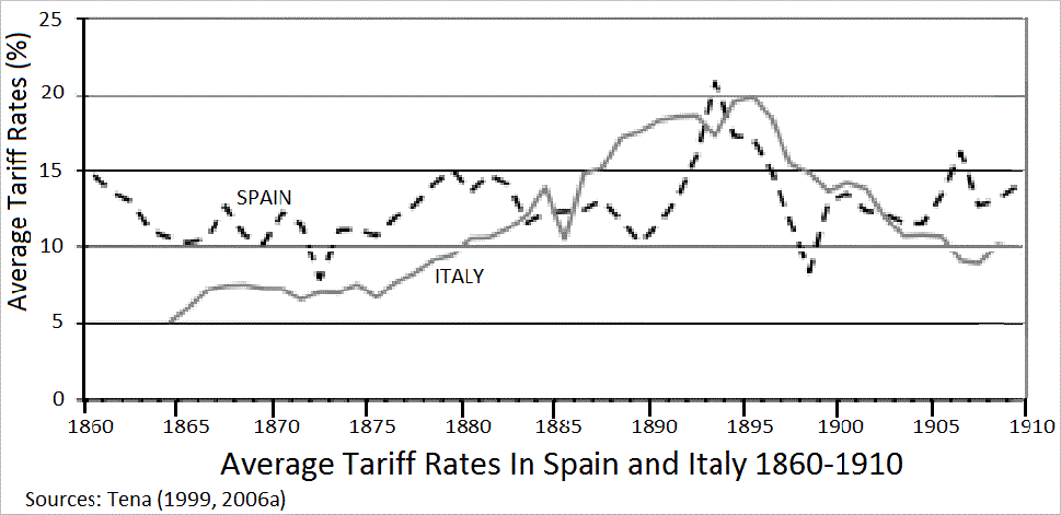 Tariff Rates in Spain and Italy (1860-1910).